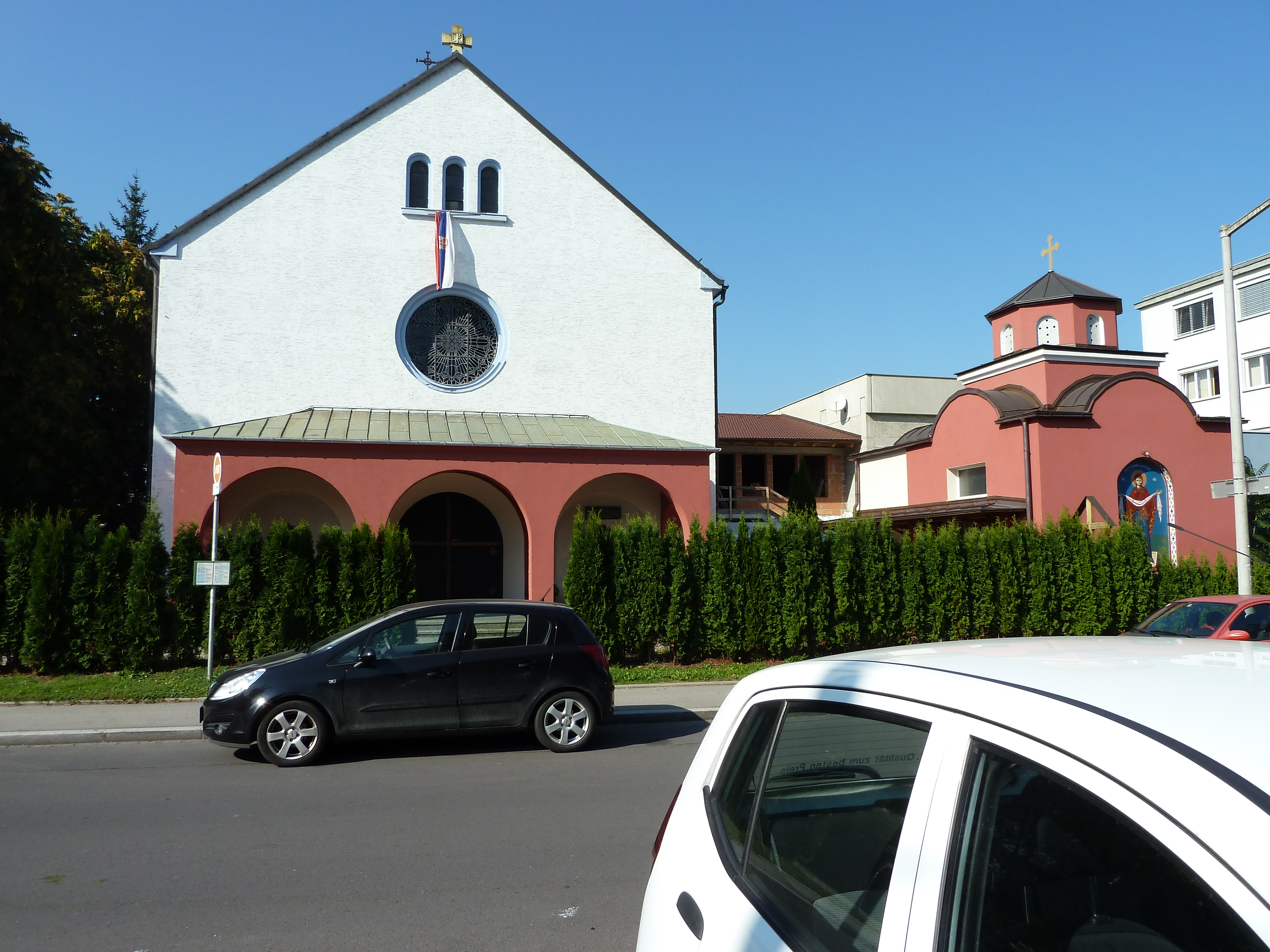 Serbisch-orthodoxe Kirche, ehem. St. Severin